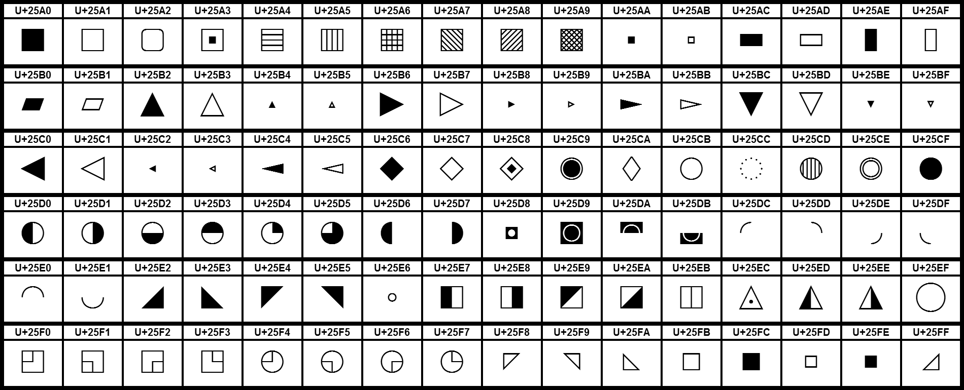 Grafiktafel für den Unicodeblock Geometrische Formen.